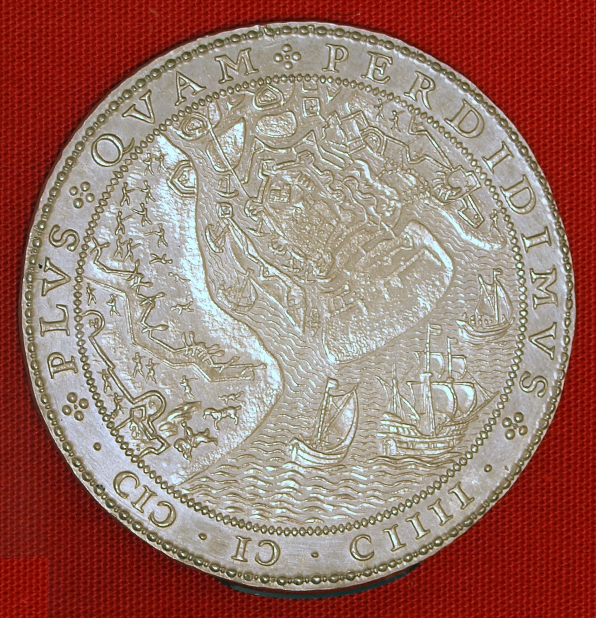 Inname van Sluis en het verlaten van Oostende, 1604 door Van den Vogelaer.